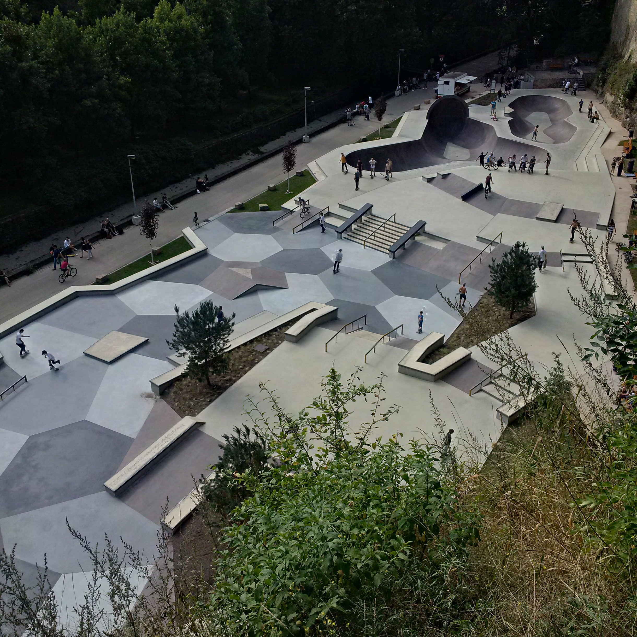 Vue sur le Skatepark Péitruss, vallée de la Pétrusse à LuxembourgLëtzebuergesch: Vue vun der Aler Bréck op de Skatepark Péitruss am Péitrussdall am Gronn